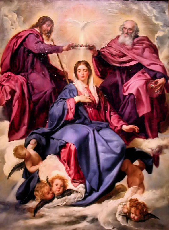 La obra representa la coronación de la Virgen María, madre de Jesucristo, por los tres miembros de la Santísima Trinidad.